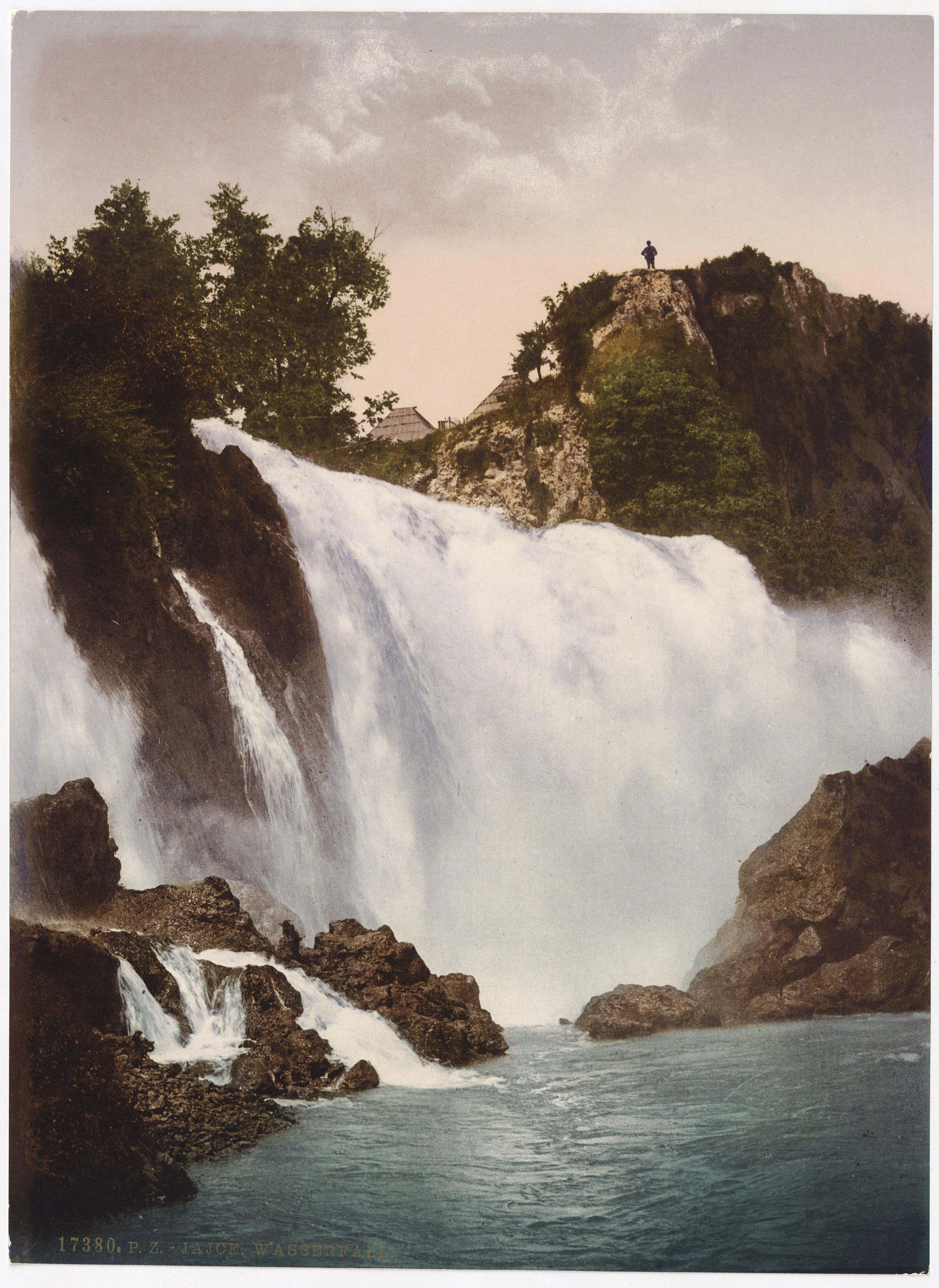 Jajce. Wasserfall